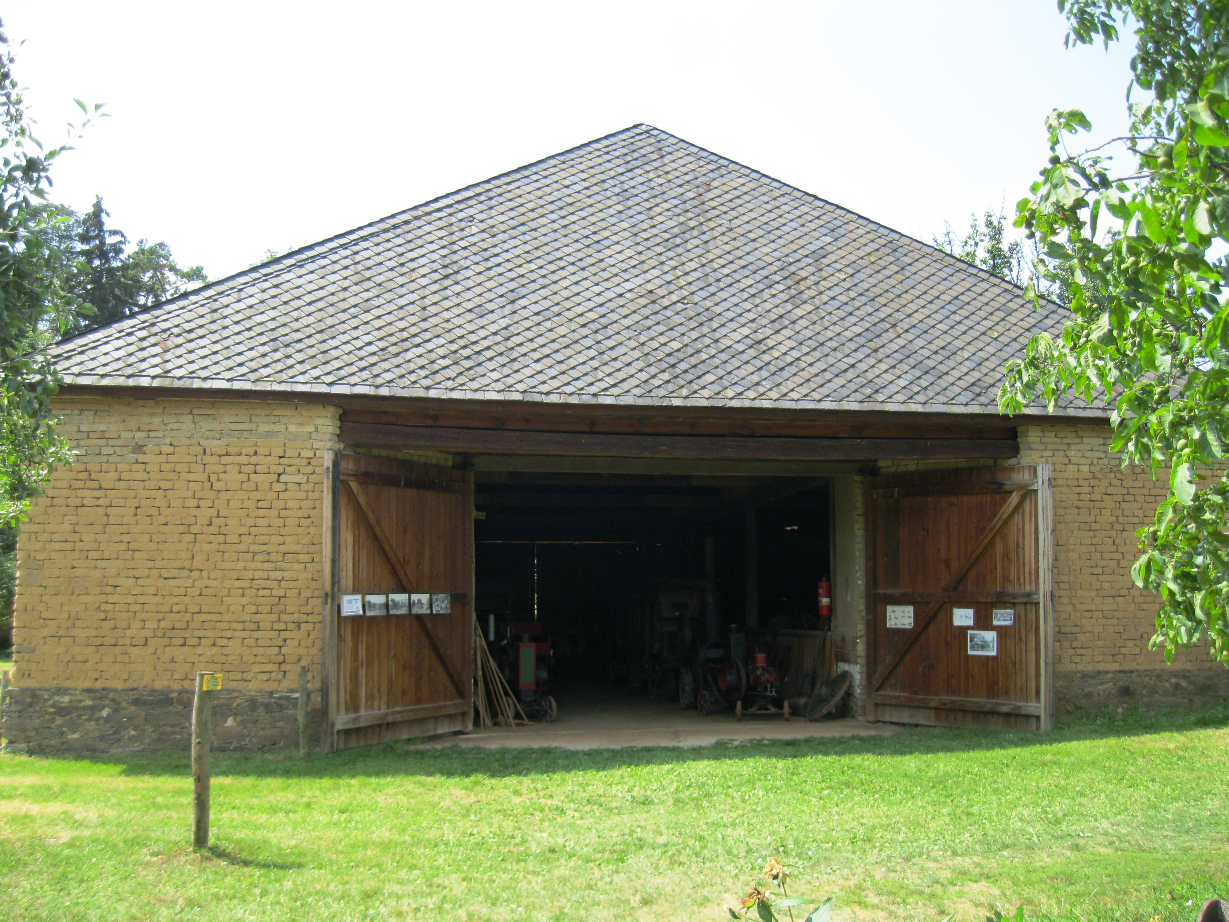 Stodola (Příkazy), v zahradě čp.52, Příkazy